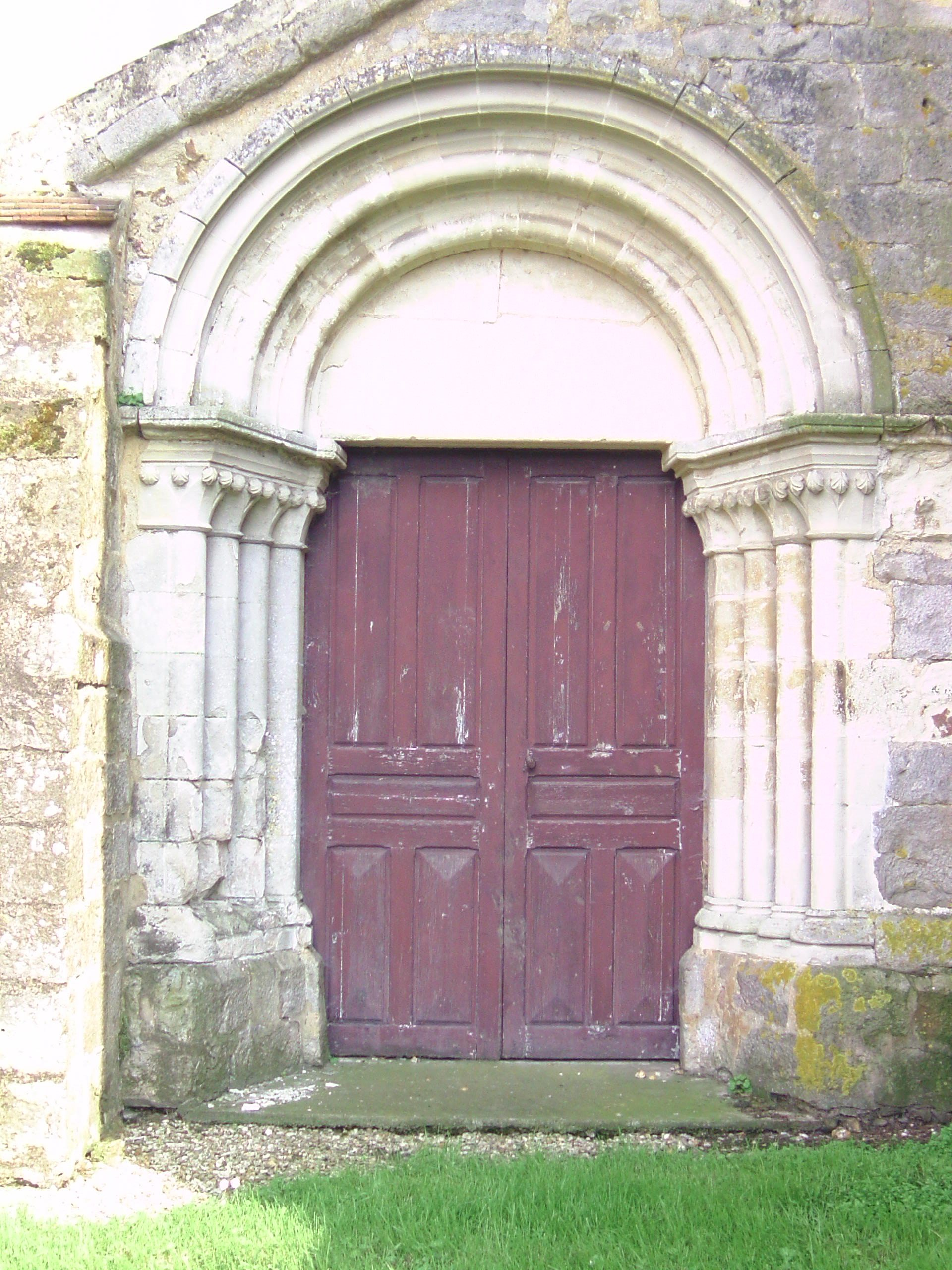 Porche de l'église de Dixmont (Yonnes - France)